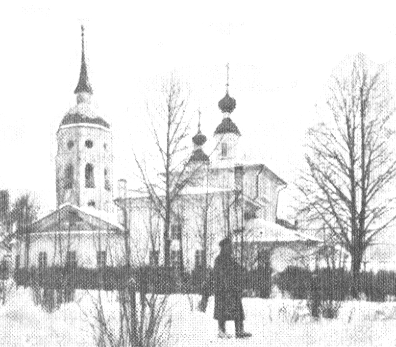 Иллюстрация книги "Православные русские обители" стр.074 илл.2